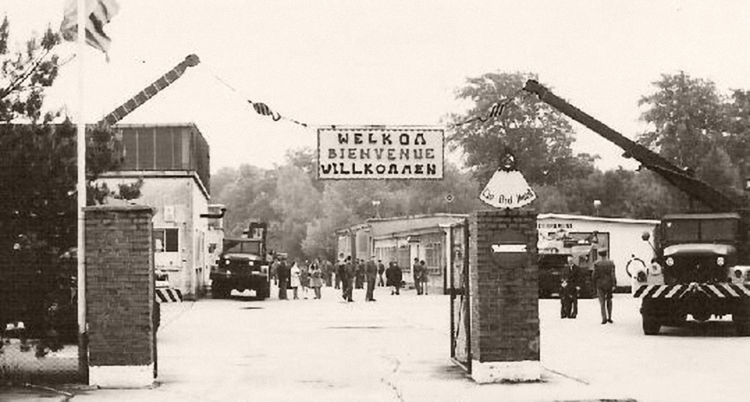 Belgische Cie Ordonance (Logistik Einheit) im Propsteierwald 1969 - Tag der Offenen Tür, Südeingang